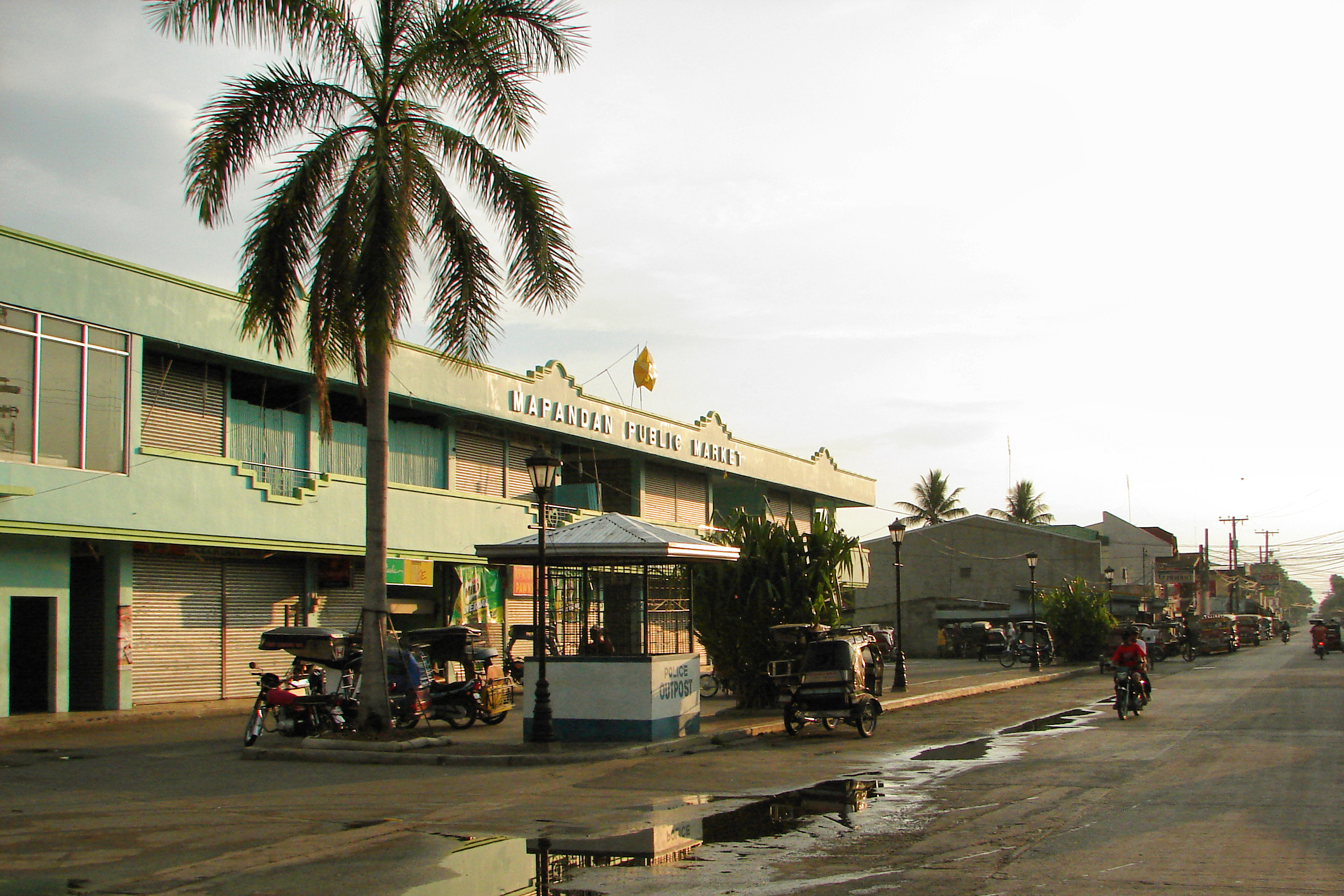 Mapandan, Pangasinan, Philippines